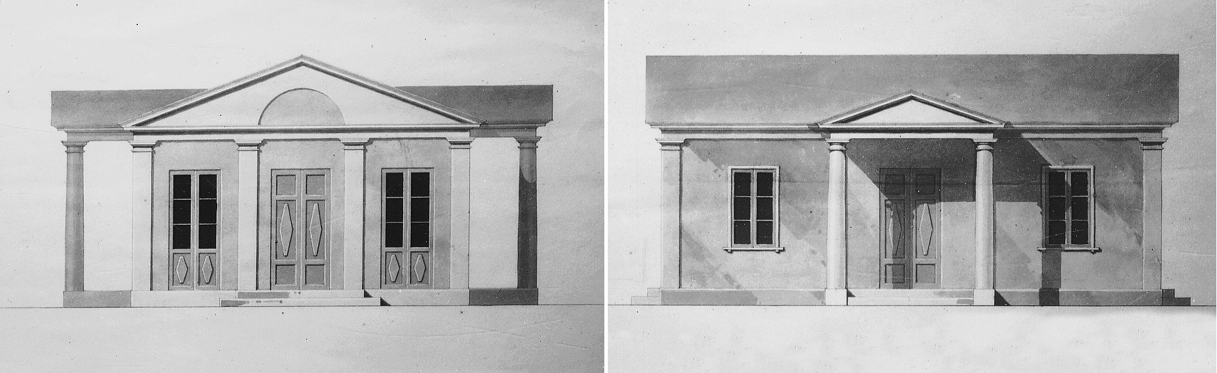 Vaktstugan, Rosendals slott, akvarellerade ritningar upprättade av arkitekt Fredrik August Lidströmer